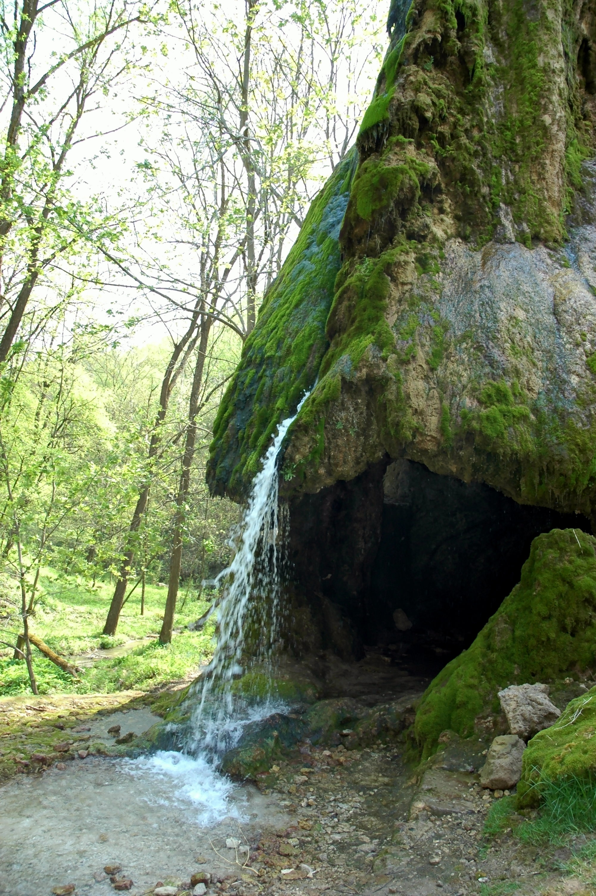 Park w Malejowcach na Podolu.